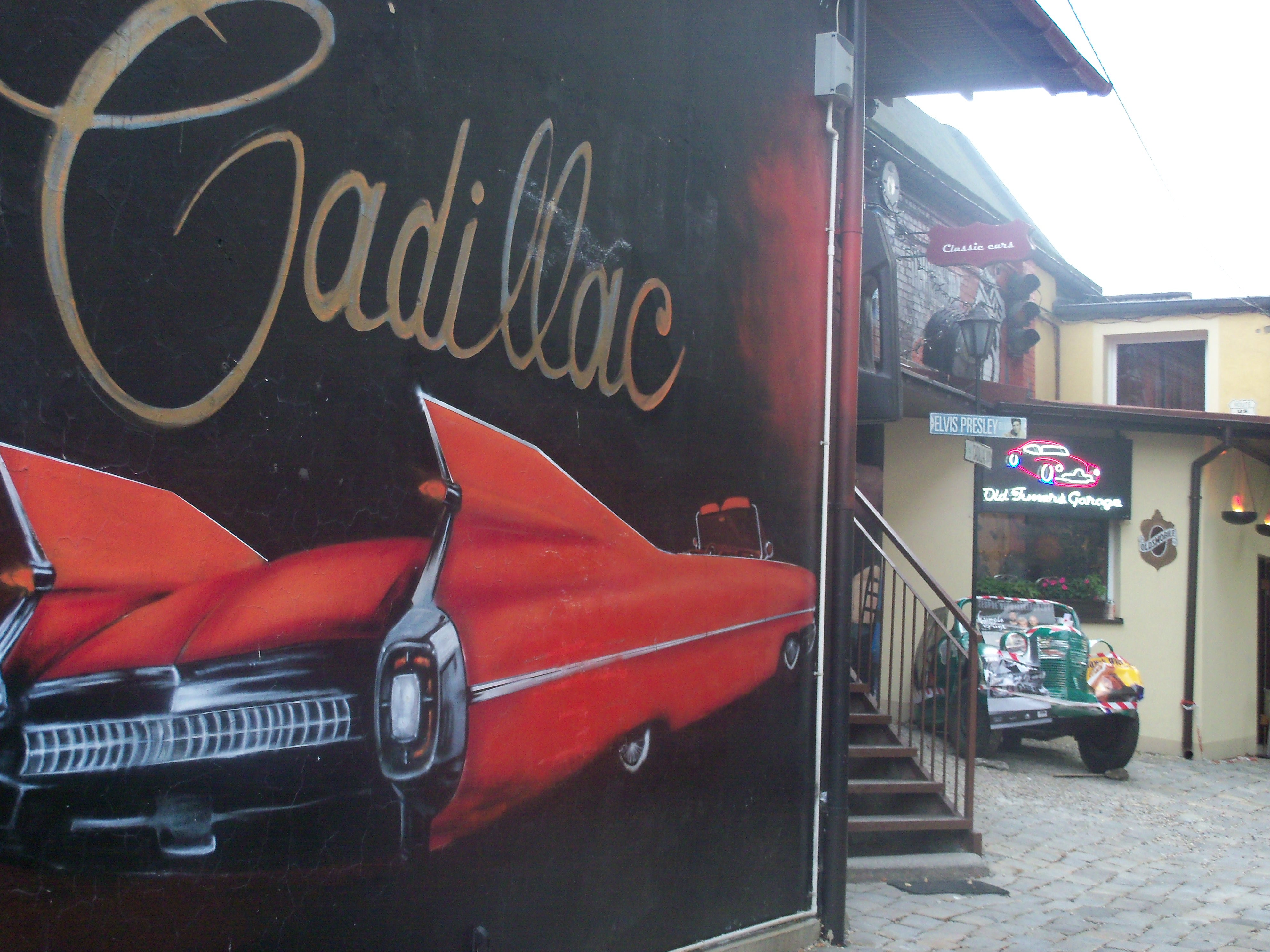 Klub Old Times Garage przy ul. gen. Zygmunta Waltera-Jankego 132, w budynku dawnego Kina PIAST (Katowice - Piotrowice)